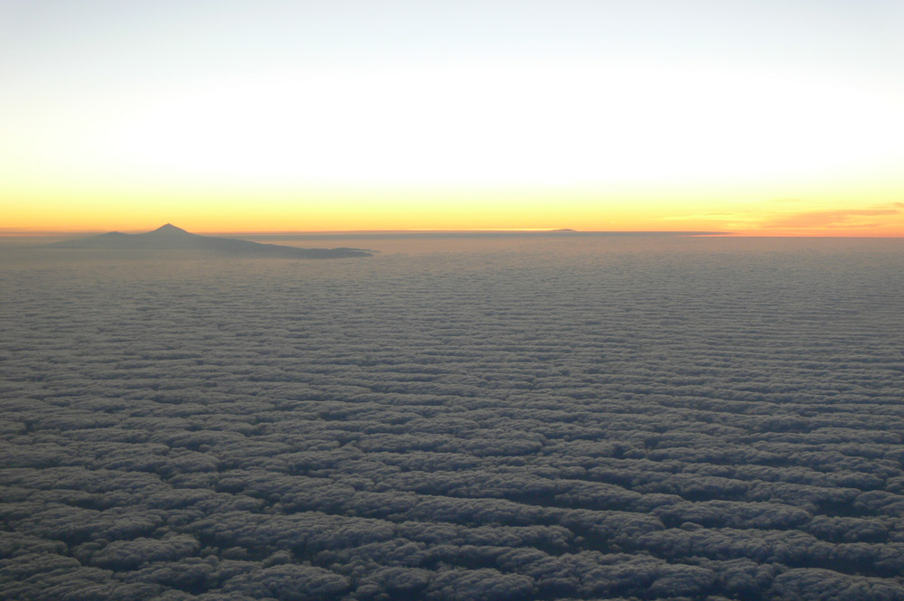 Formación del mar de nubes en la cumbre de Gran Canaria. Al fondo el Pico Teide (isla de Tenerife)